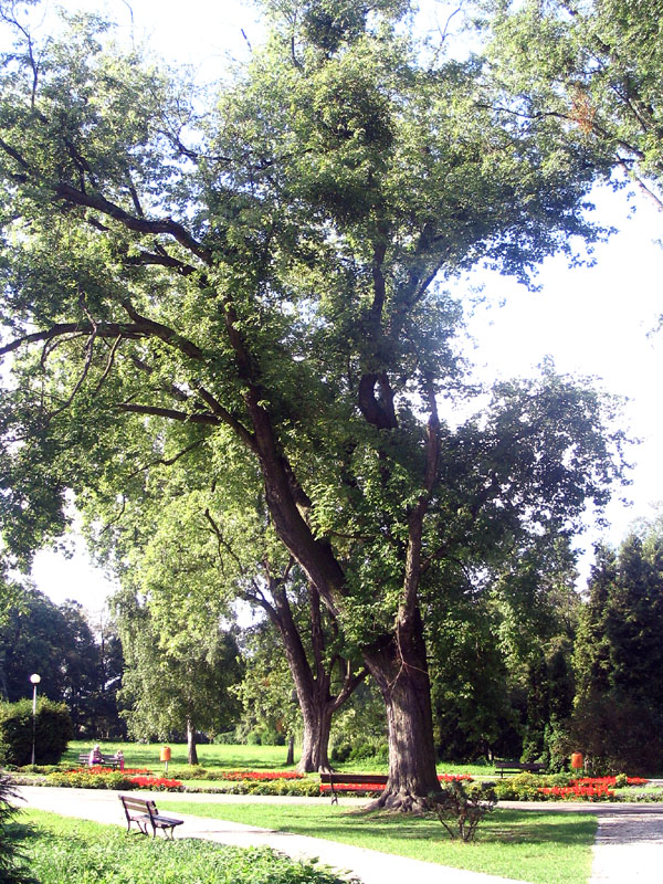 Pomnikowy klon srebrzysty w Parku Miejskim w Pile